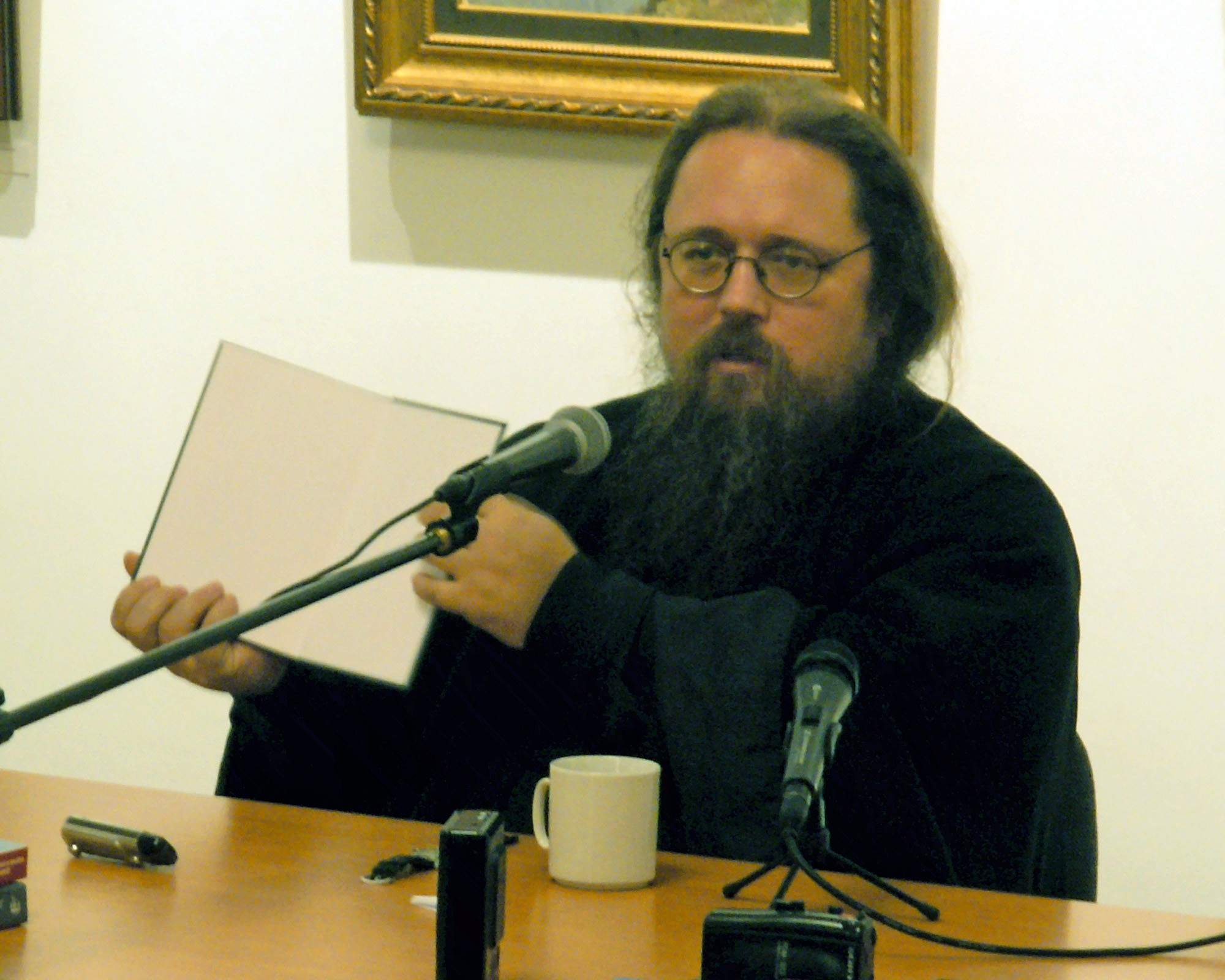 Андрей Кураев на лекции в Туле